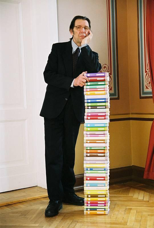 Hando Runnel Tartu Kirjanike Majas 21. märtsil 2002, seismas kirjastuse Ilmamaa poolt välja antud "Eesti mõtteloo" sarja raamatutega.